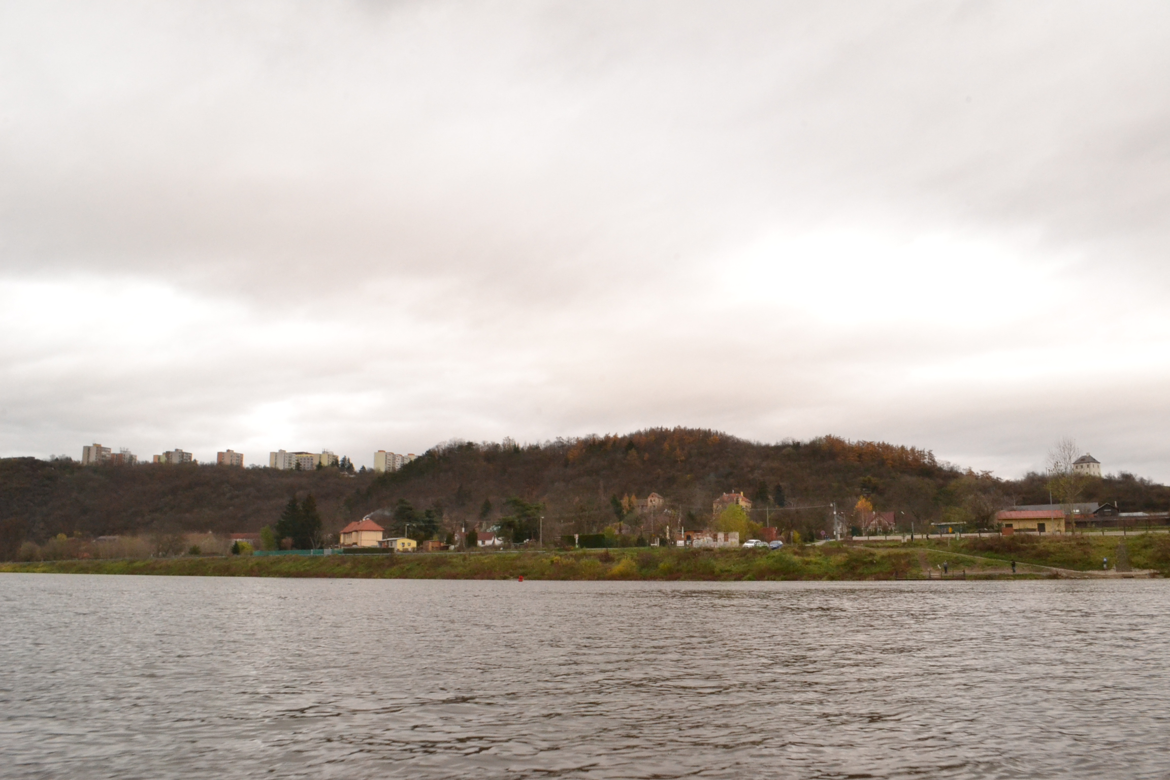 Pohled na Podhoří z druhé strany řeky